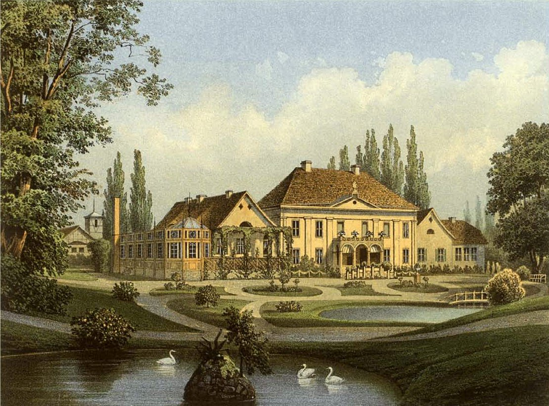 Schloss Varzin, Kreis Schlawe, Provinz Pommern